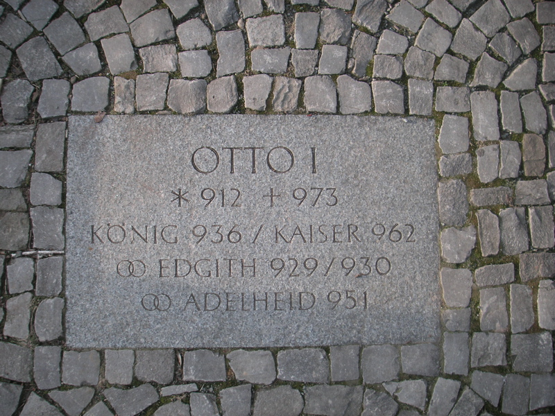 Der Weg der Ottonen: Otto I Fotografiert am Magdeburger Domplatz.